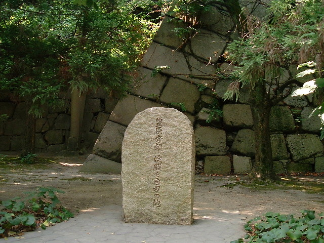 丰臣秀赖自刃之地(大阪城天守阁东)